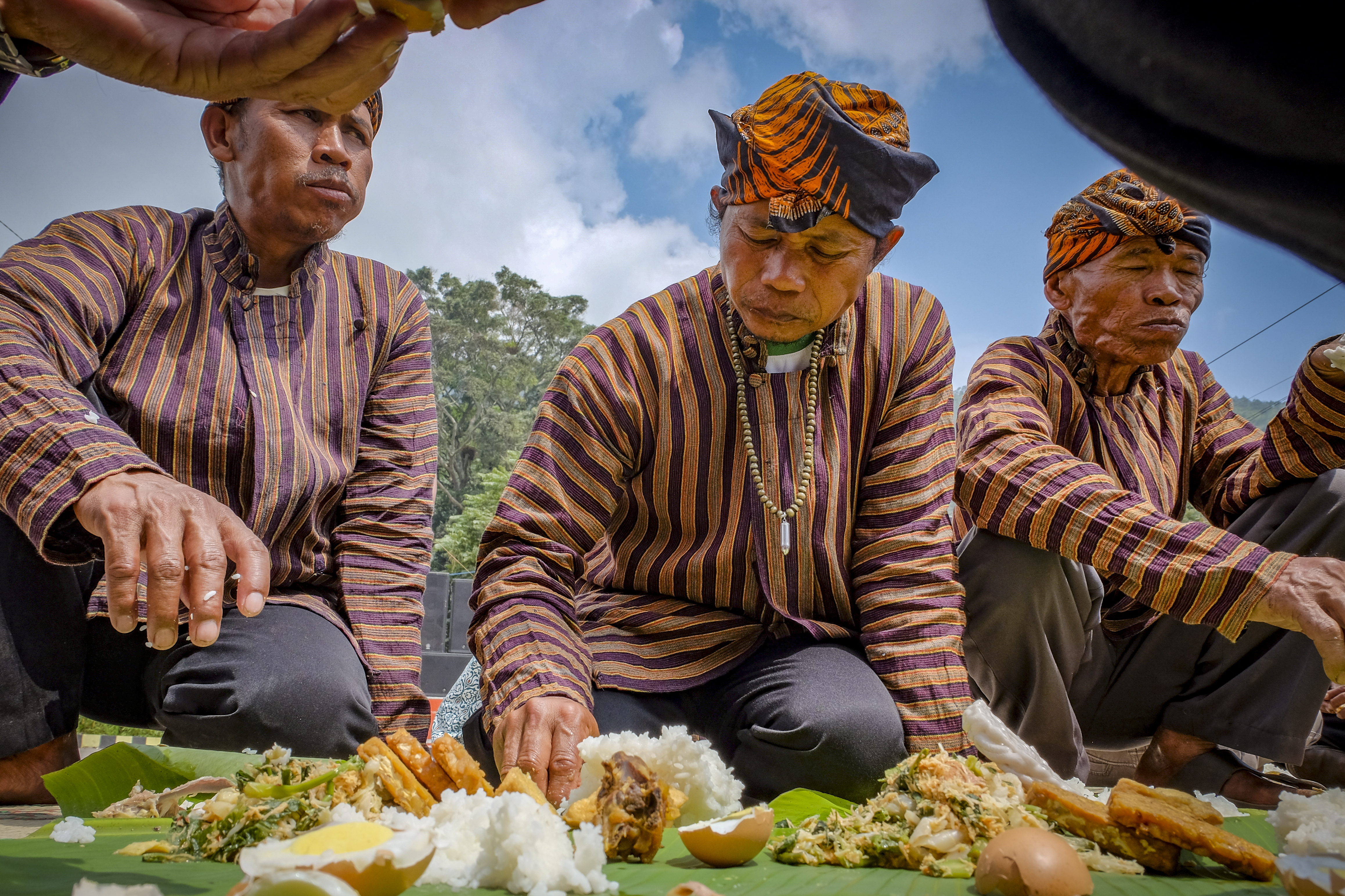 Perwujudan rasa syukur dan kebersamaan dalam bermasyarakat